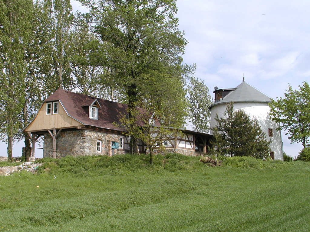 Větrný mlýn u Uhelné po rekonstrukci v roce 2000